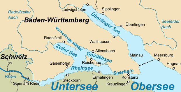 Bodensee, Bezeichnungen der Unterseen